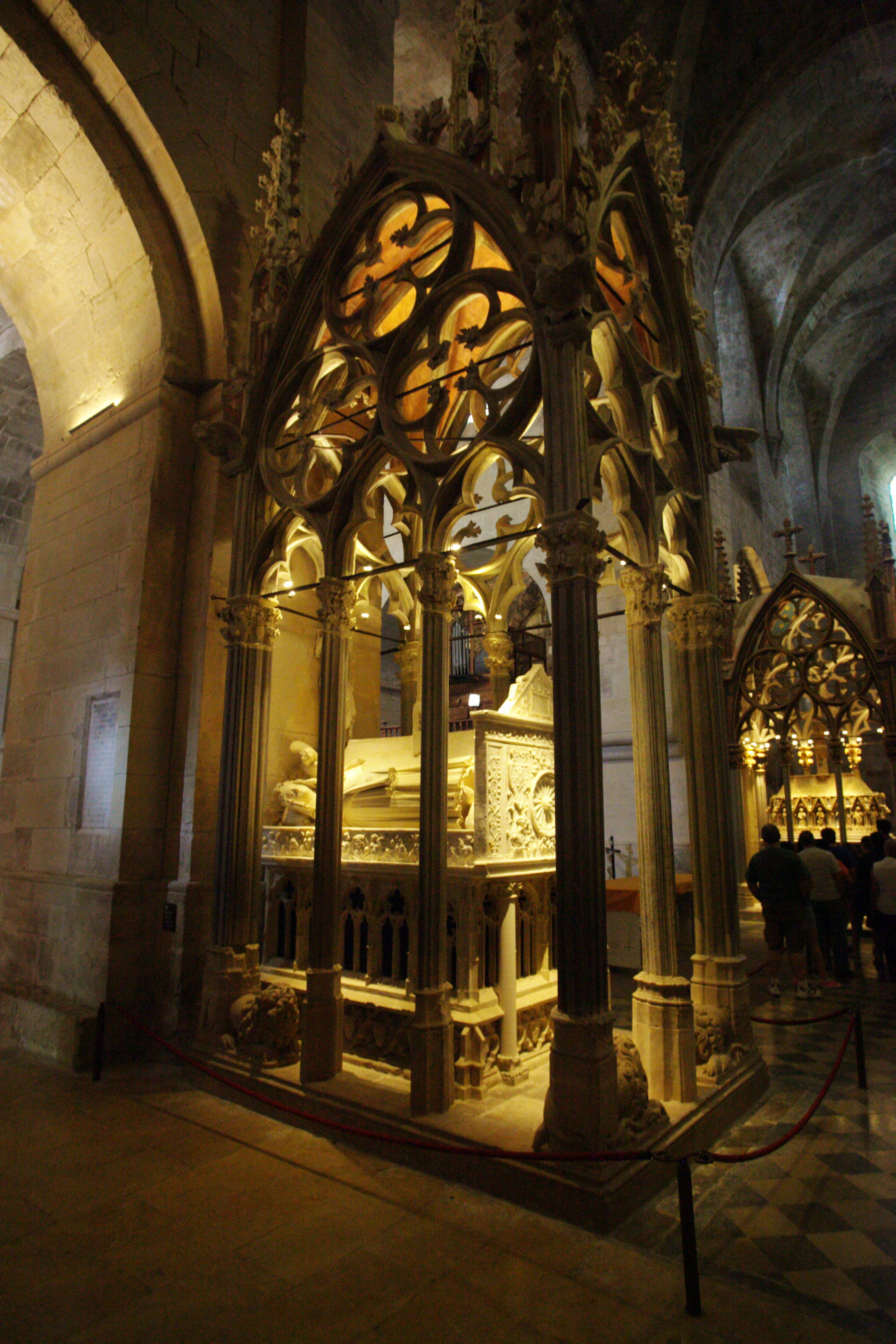 Monestir de Santes Creus (Alt Camp, Catalonia)